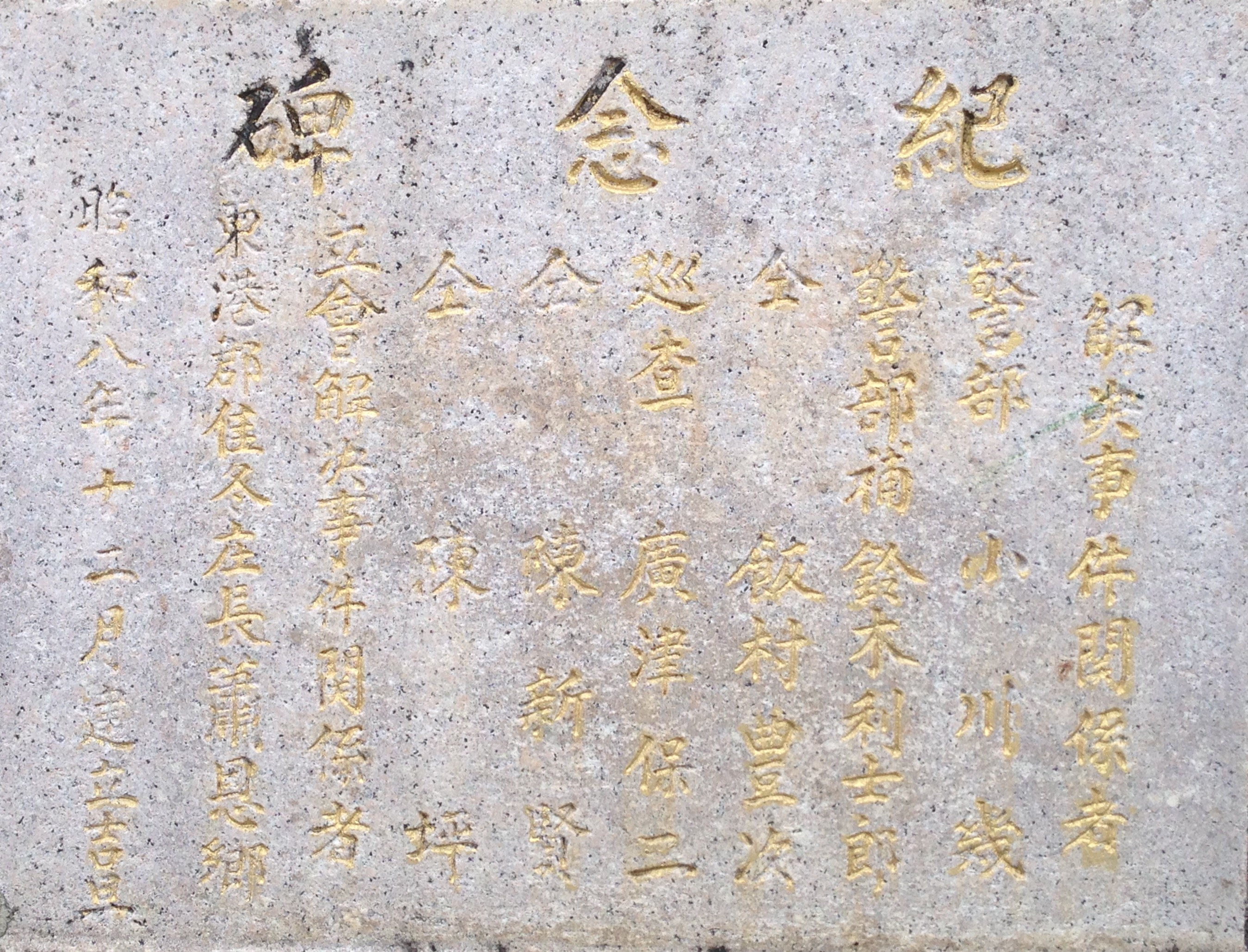 中文（台灣）: 碑上所載的解決事情關係者